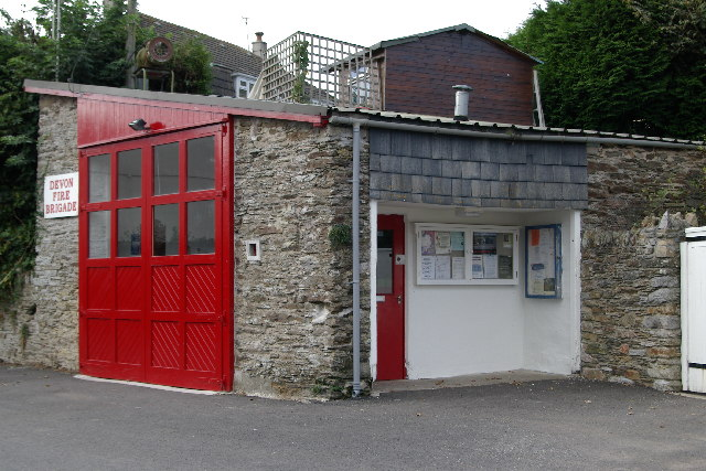 Kingston Fire Station, Devon